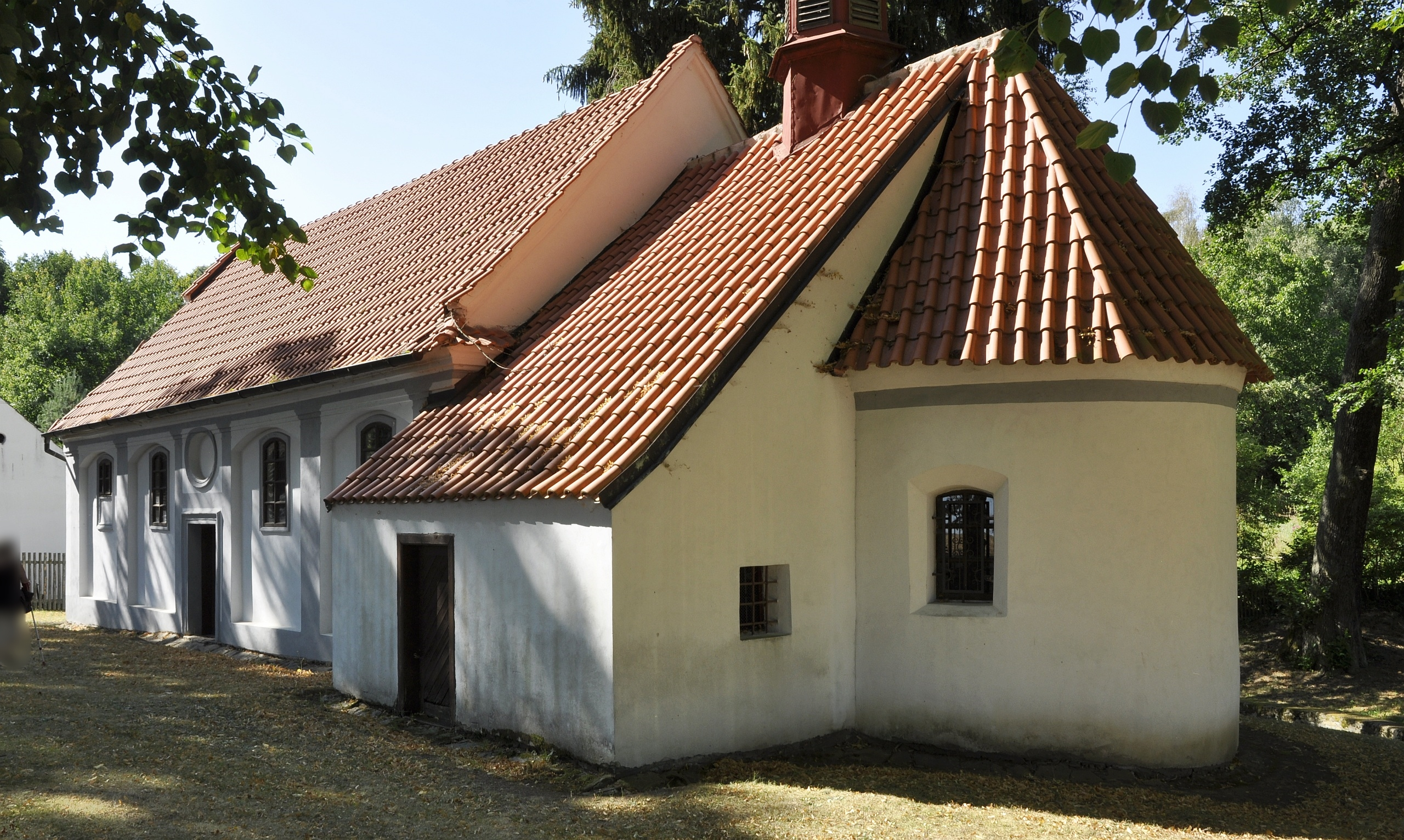 Kaple svaté Rozálie, za vsí, Bernartice (okres Písek).